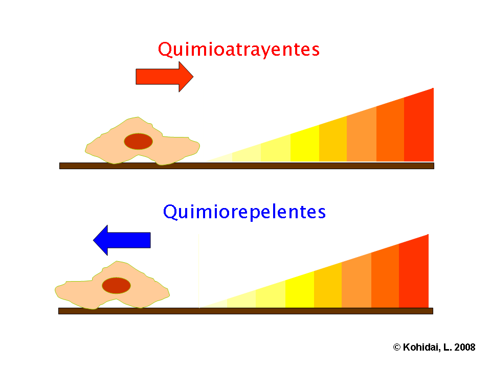 Quimioatrayentes y quimiorepelentes